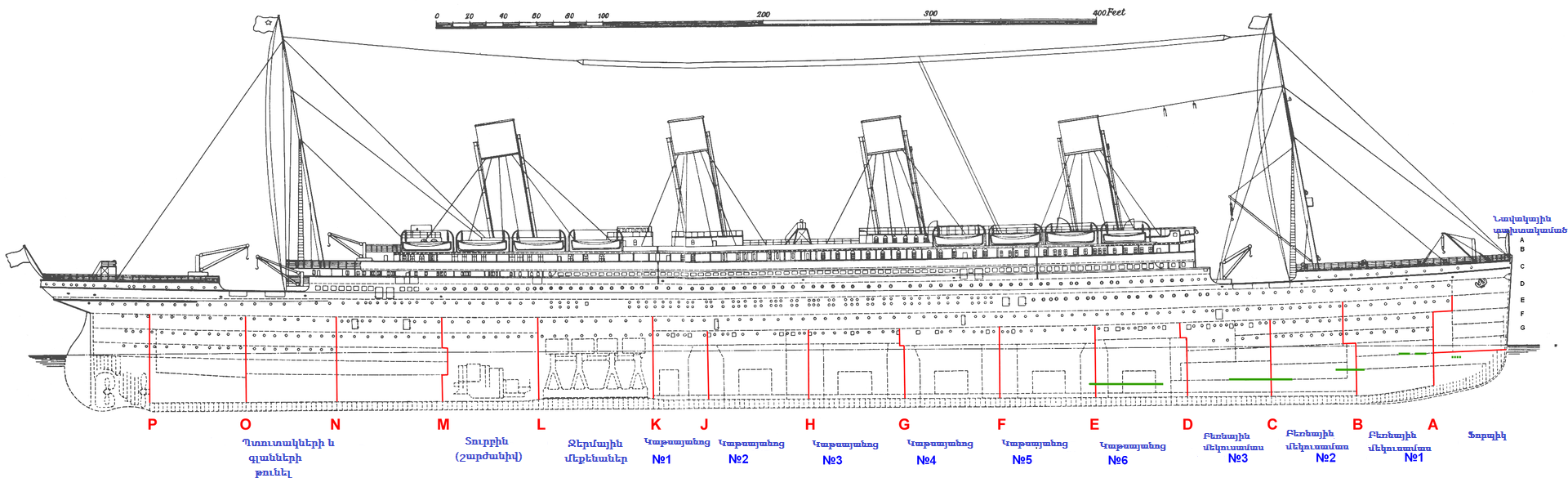 «Տիտանիկ»-ի գծագիրը: Կանաչ գույնով նշված են երեսվածքի ճեղքվածքները, կարմիրով՝ միջնորմներինը